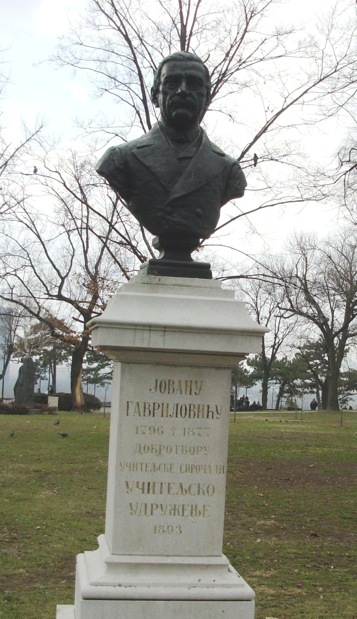 Jovan Gavrilović, bista na Kalimegdanu, Beograd, Srbija. Slikao Goldfinger